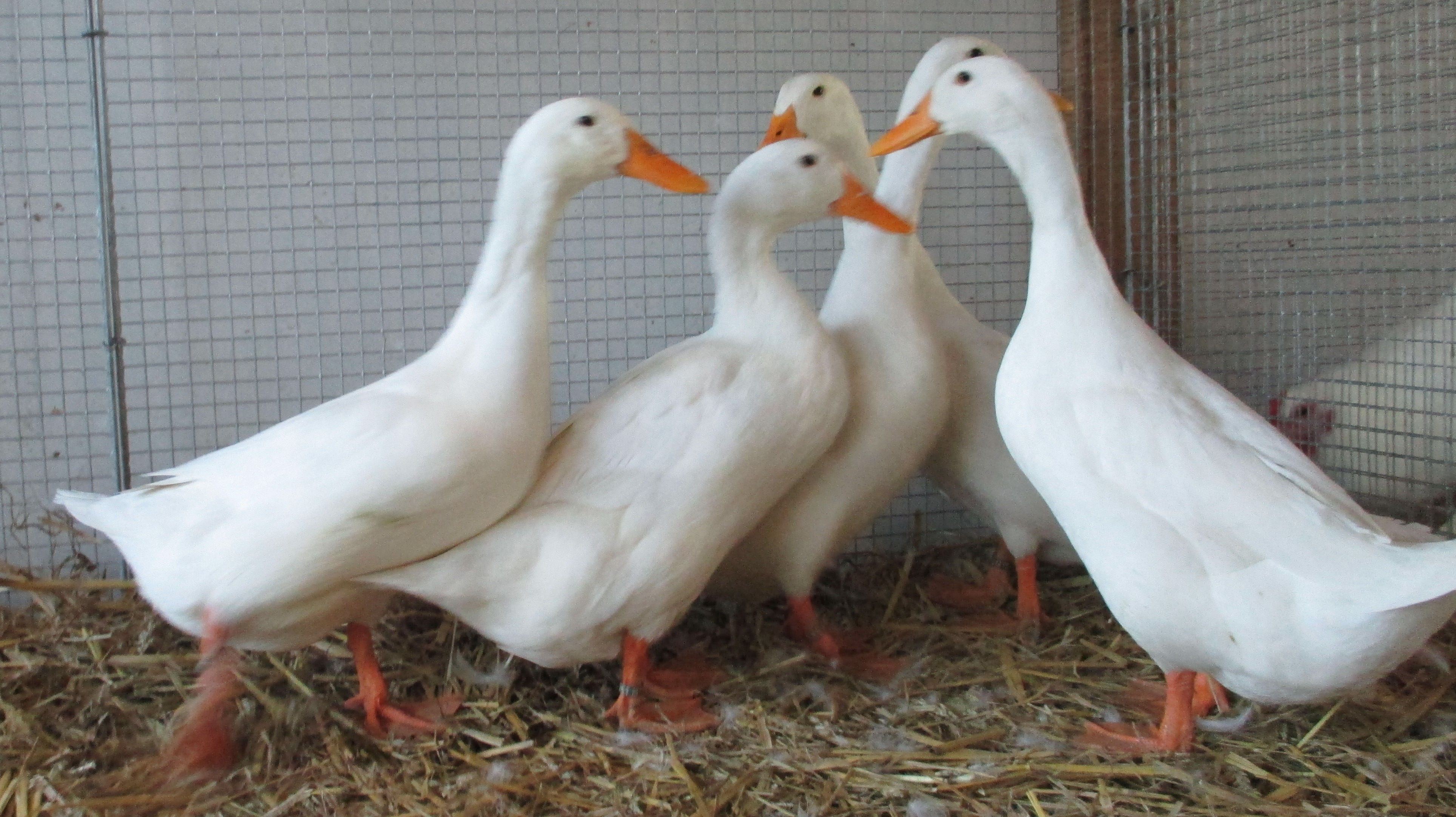 Herde weißer Deutscher Campbellenten